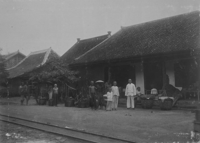 Foto. Chinese toko te Pamanoekan.